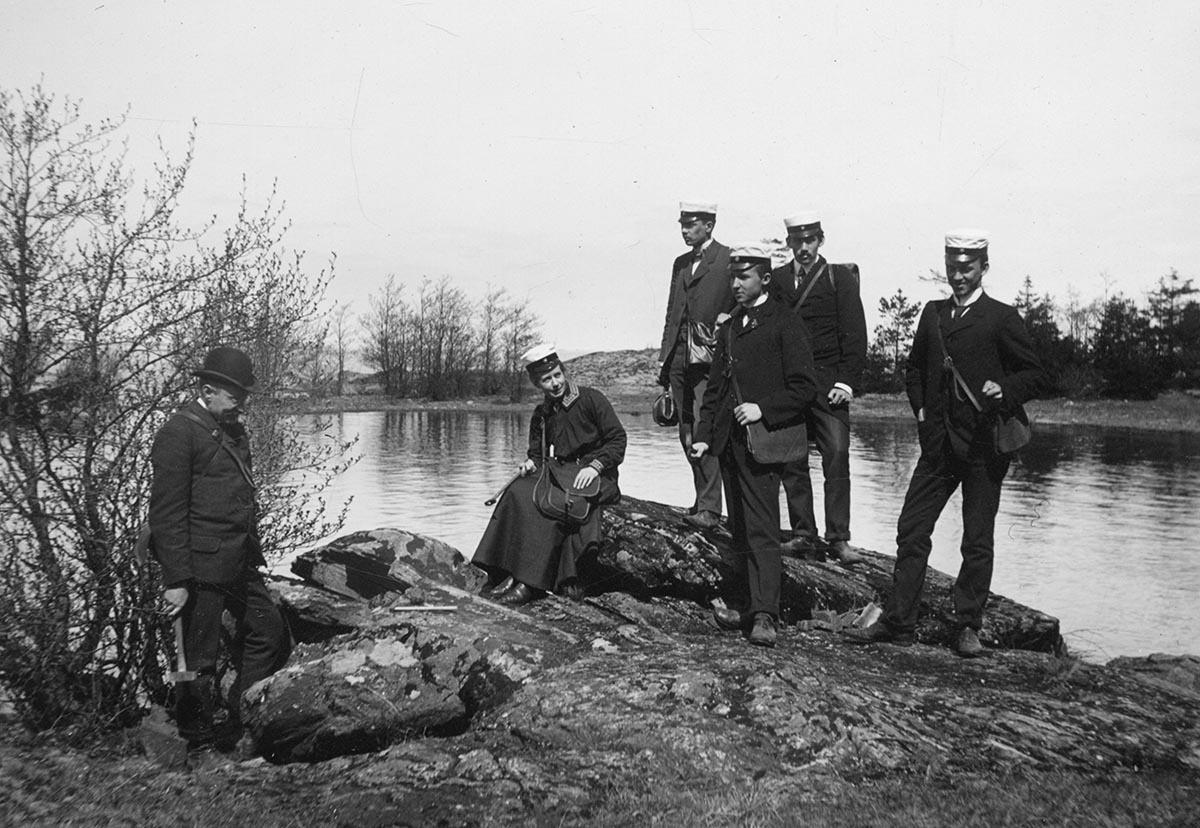 Axel Hamberg med elever på exkursion till Kinnekulle